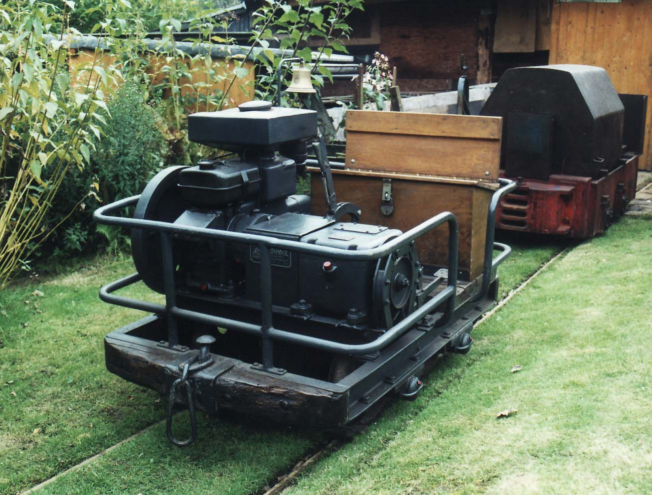 Khrönke 318 uit 1960